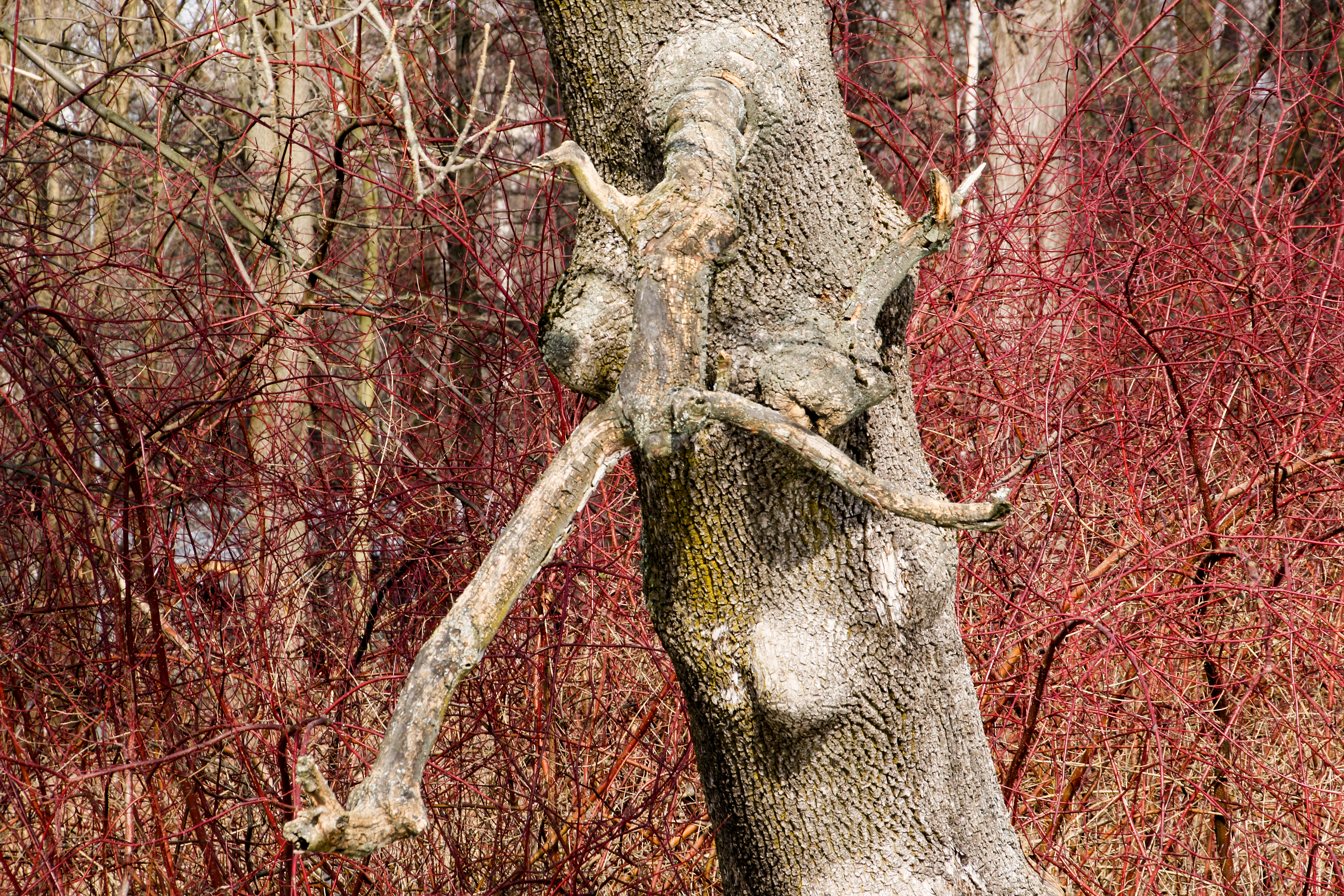 Забавное дерево в парке на Крестовском острове Санкт-Петербурга